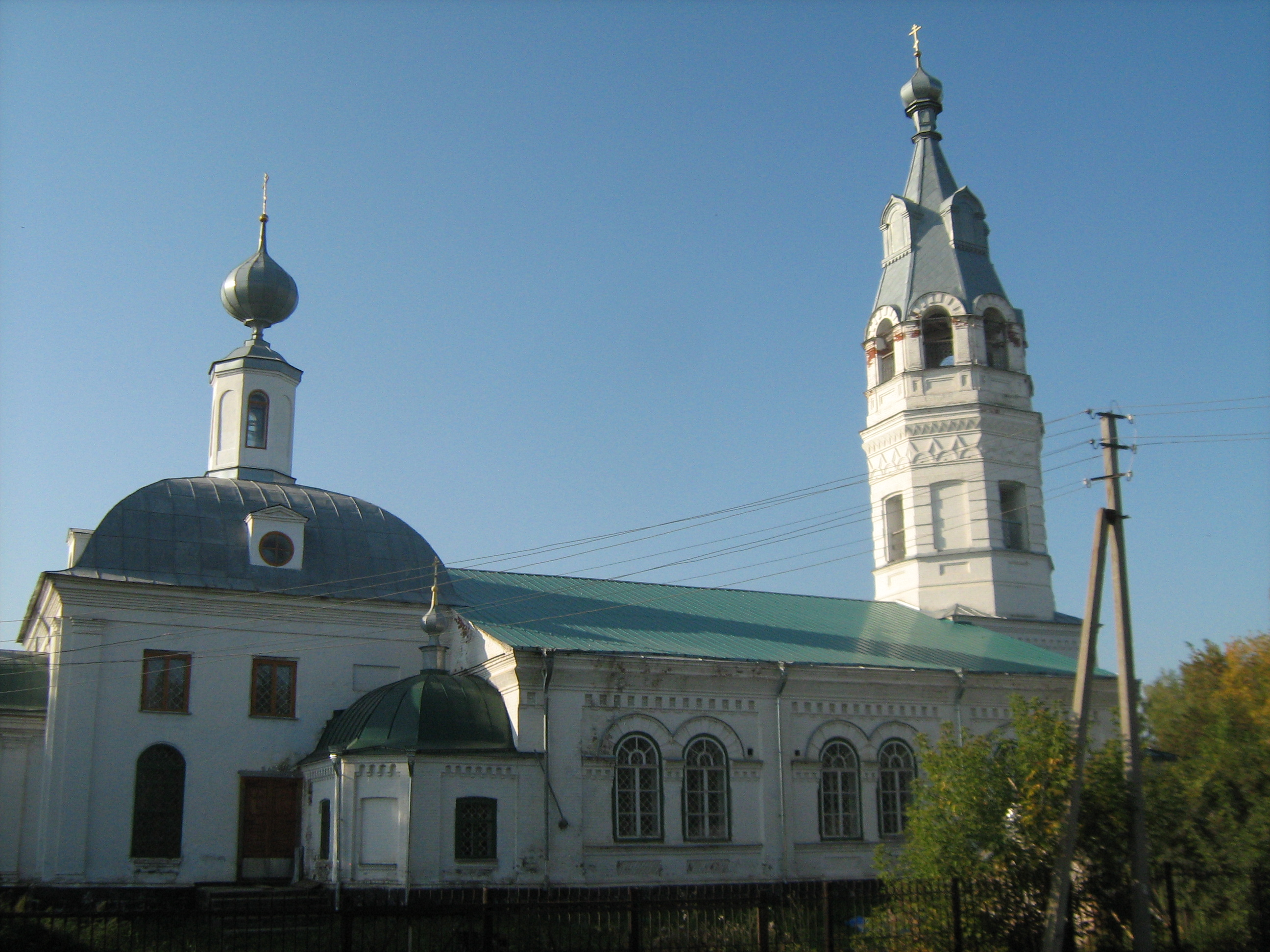 вид с северной стороны, 2009 г.